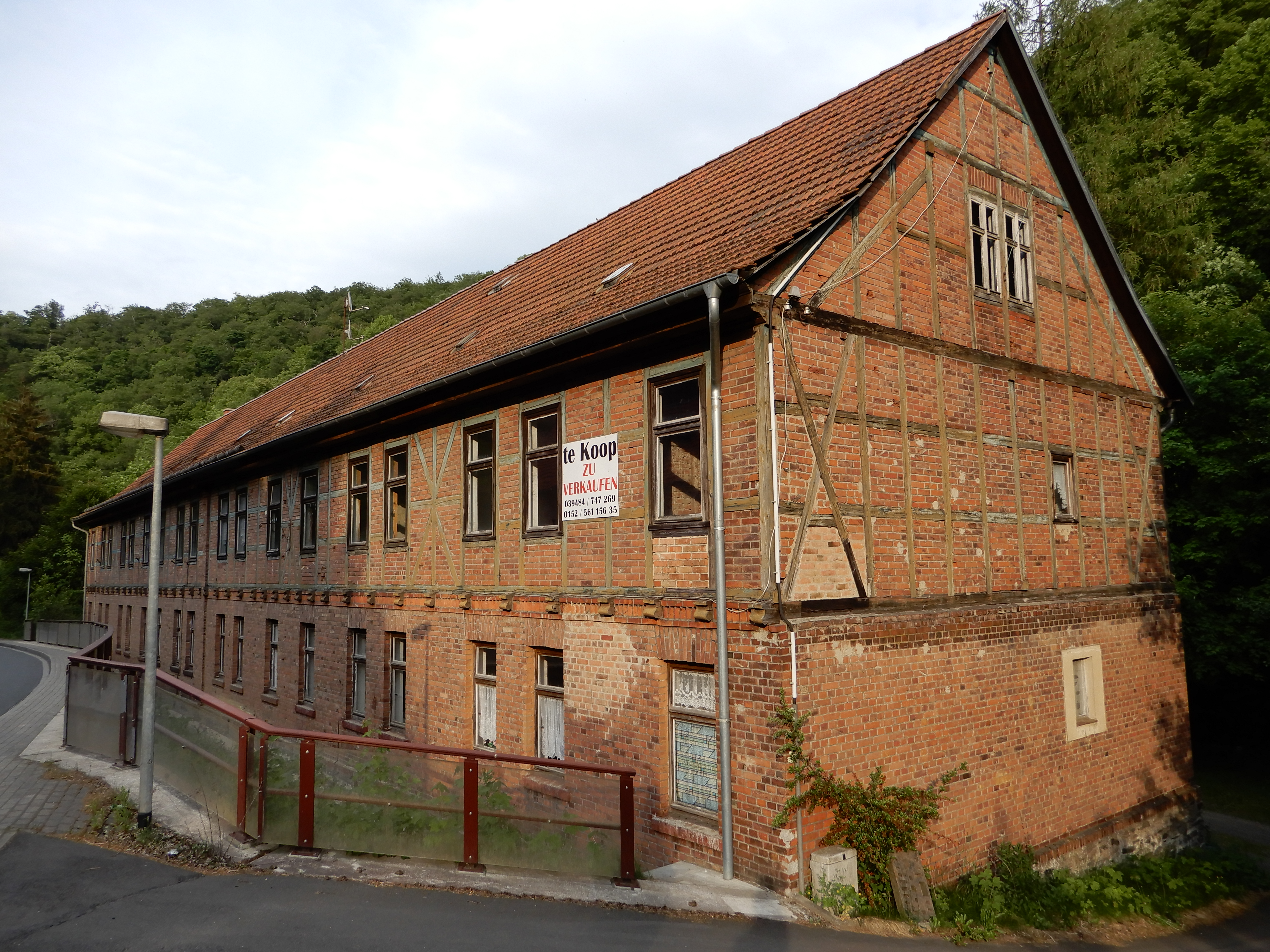 Haus Stahlhammer 3